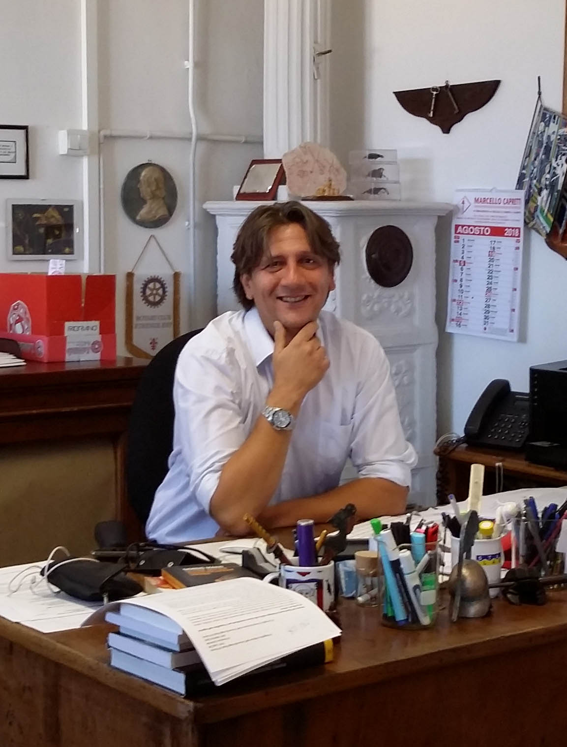 Photo of David Caramelli italian scientist